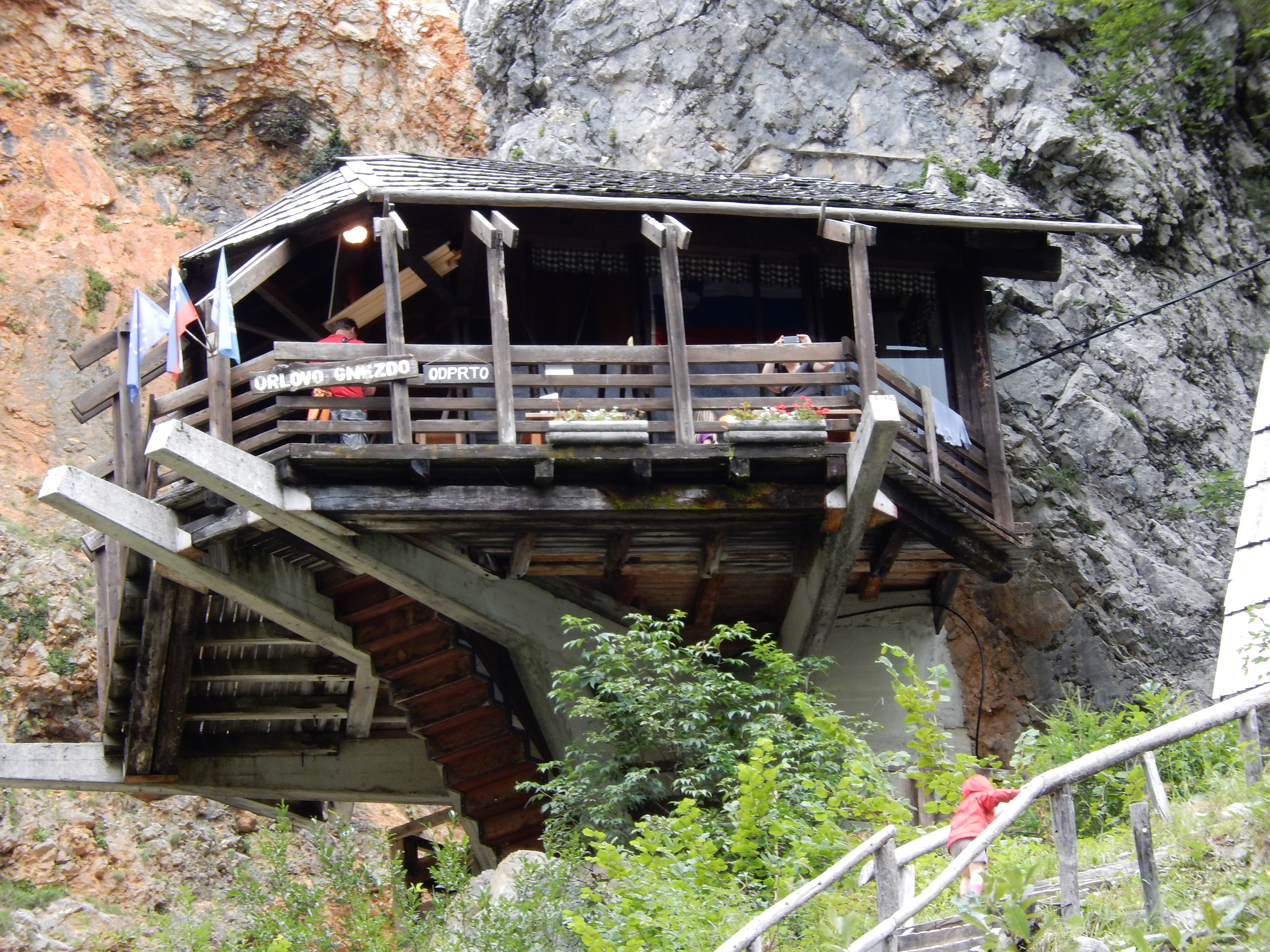 3335 Logarska Dolina, Slovenia